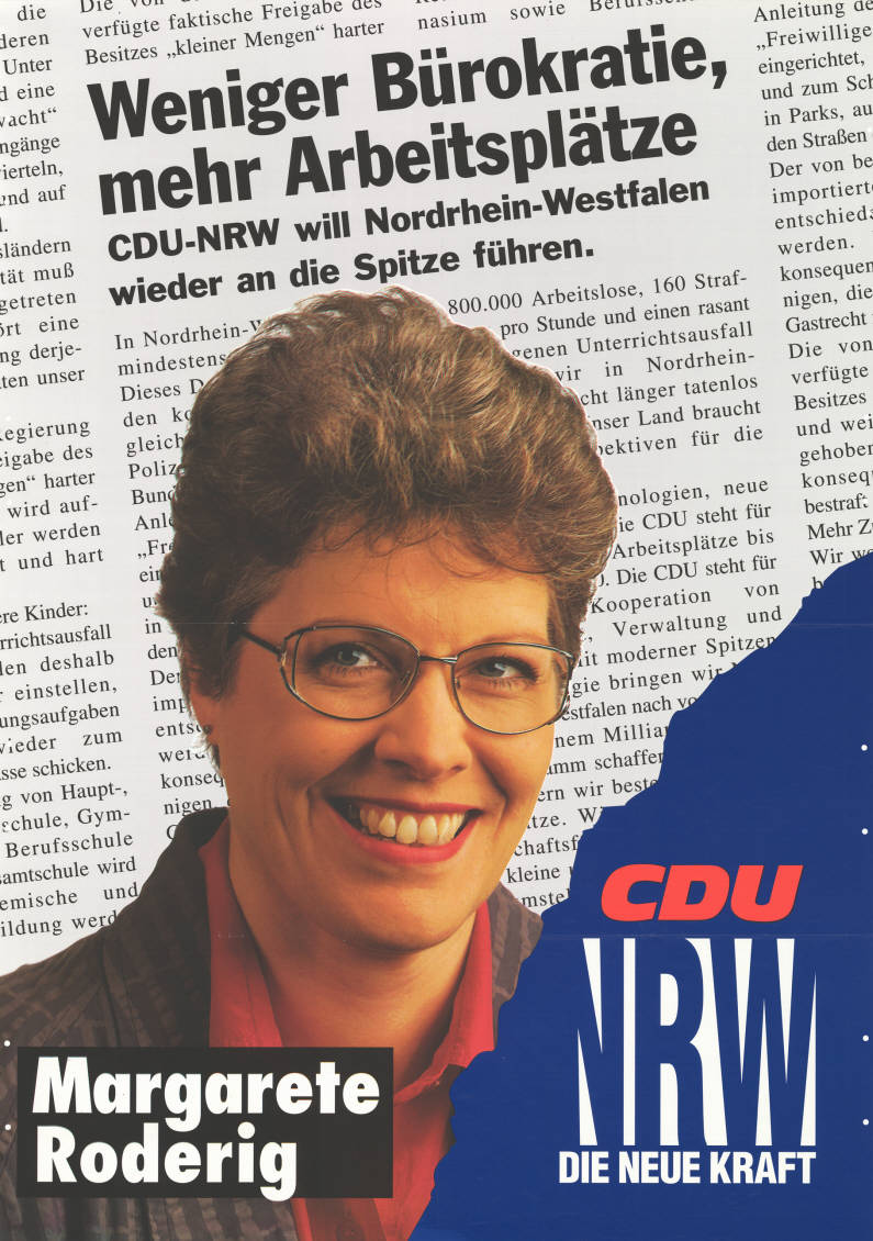 Weniger Bürokratie, mehr Arbeitsplätze CDU-NRW will Nordrhein-Westfalen wieder an die Spitze führen. Margarete Roderig CDU NRW Die neue KraftAbbildung:Porträtfoto - ZeitungsartikelPlakatart:Kandidaten-/Personenplakat mit PorträtObjekt-Signatur:10-009 : 1323Bestand:Landtagswahlplakate Nordrhein-Westfalen (10-009)GliederungBestand10-18:Landtagswahlplakate Nordrhein-Westfalen (10-009) » CDULizenz:KAS/ACDP 10-009 : 1323 CC-BY-SA 3.0 DE